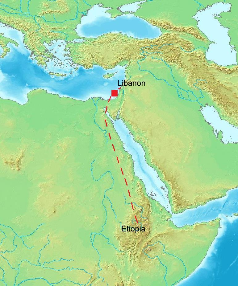 Ethiopian Airlinesin lennon 409 onnettomuutta kuvaava kartta.